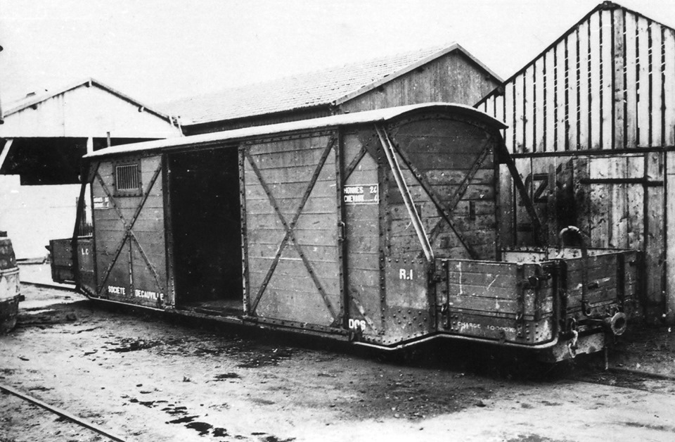 Une de fameux wagons surbaissés qui fut utilisé pour le transports des chevaux. Ce type de wagon sera mis aussi en service sur le Tramway de Pithiviers à Toury mais aussi sur le chemin de fer militaire du Maroc on certains exemplaires ont été transformés en voitures pour le transport des voyageurs. Ce matériel mesurait une dizaine de mètre de long sur 1,50m de large.